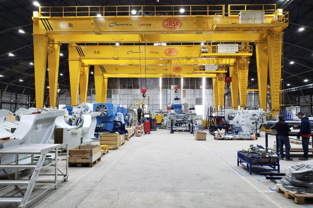 Porticos para línea de montaje de Aerogeneradores en FAdeA, Córdoba, Argentina